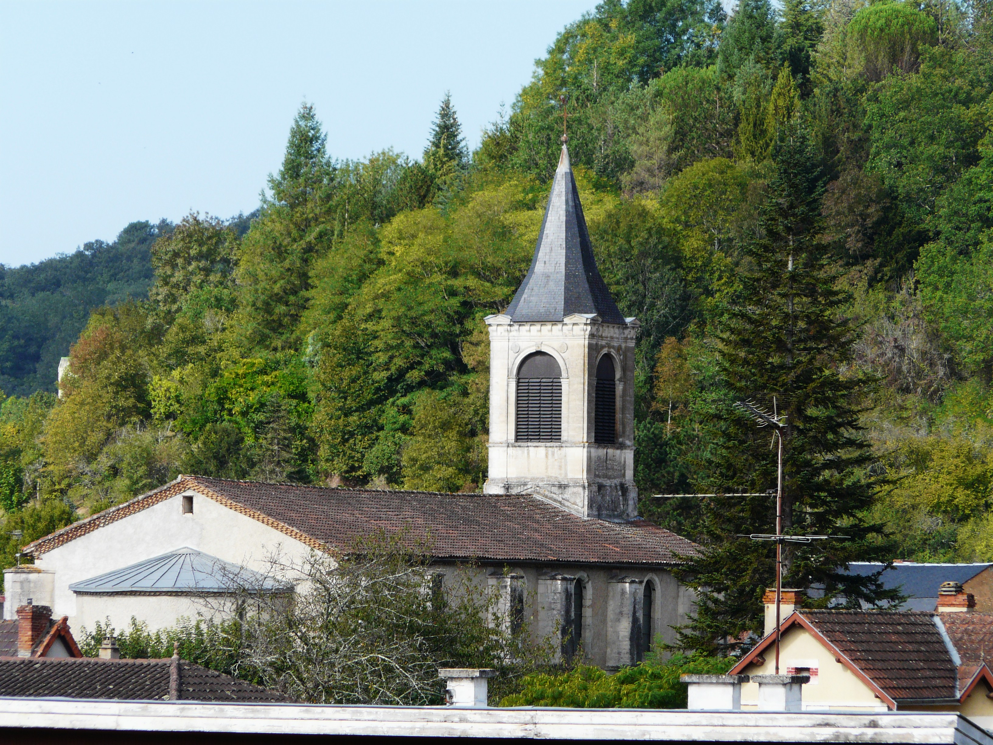 L'église de Vergt, Dordogne, France.